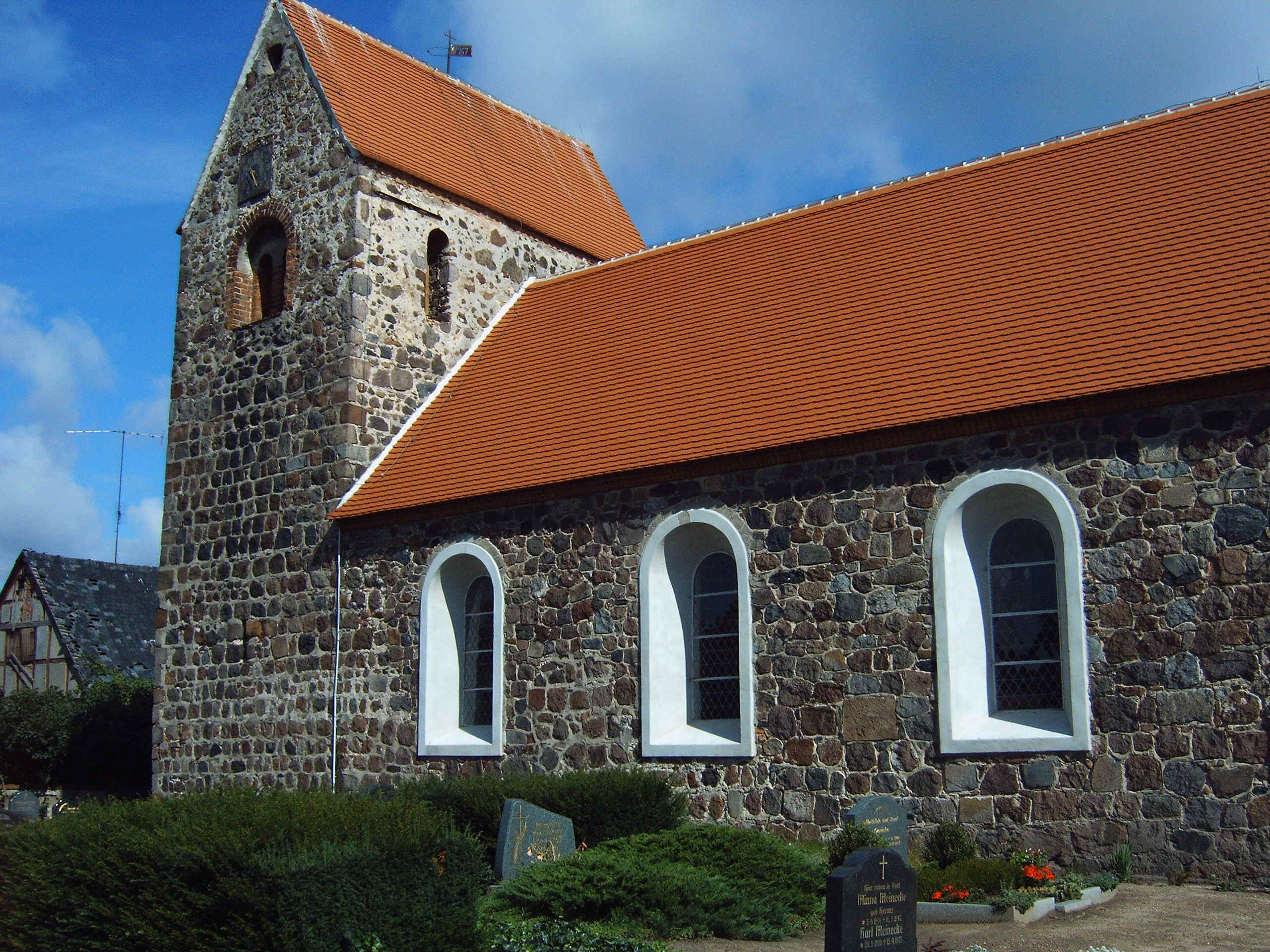 Kirche in Düsedau, Bild aufgenommen am 7.8.2005 von Olaf Meister, erteilte Lizenz: GNU-FDL